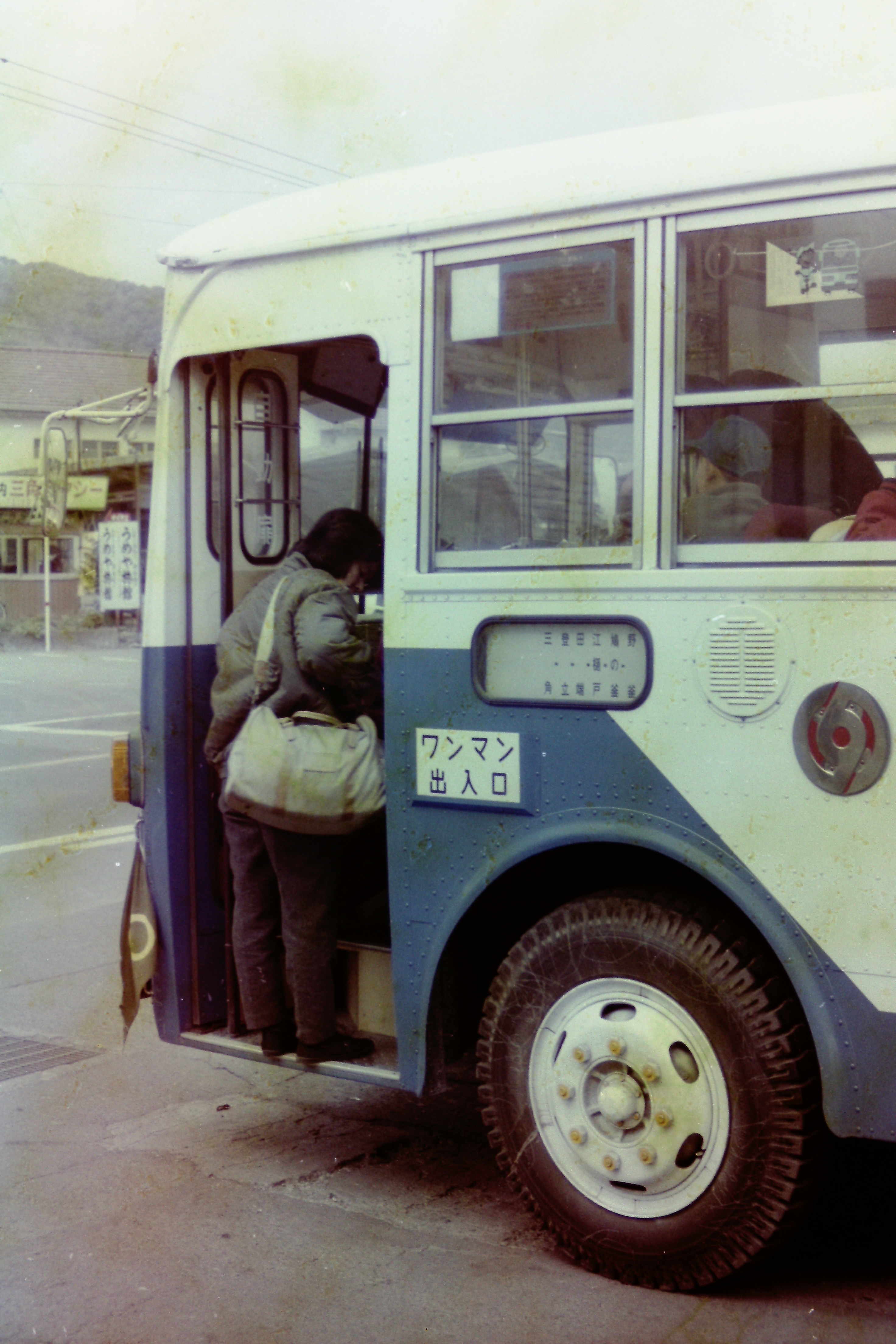 いすゞBA20